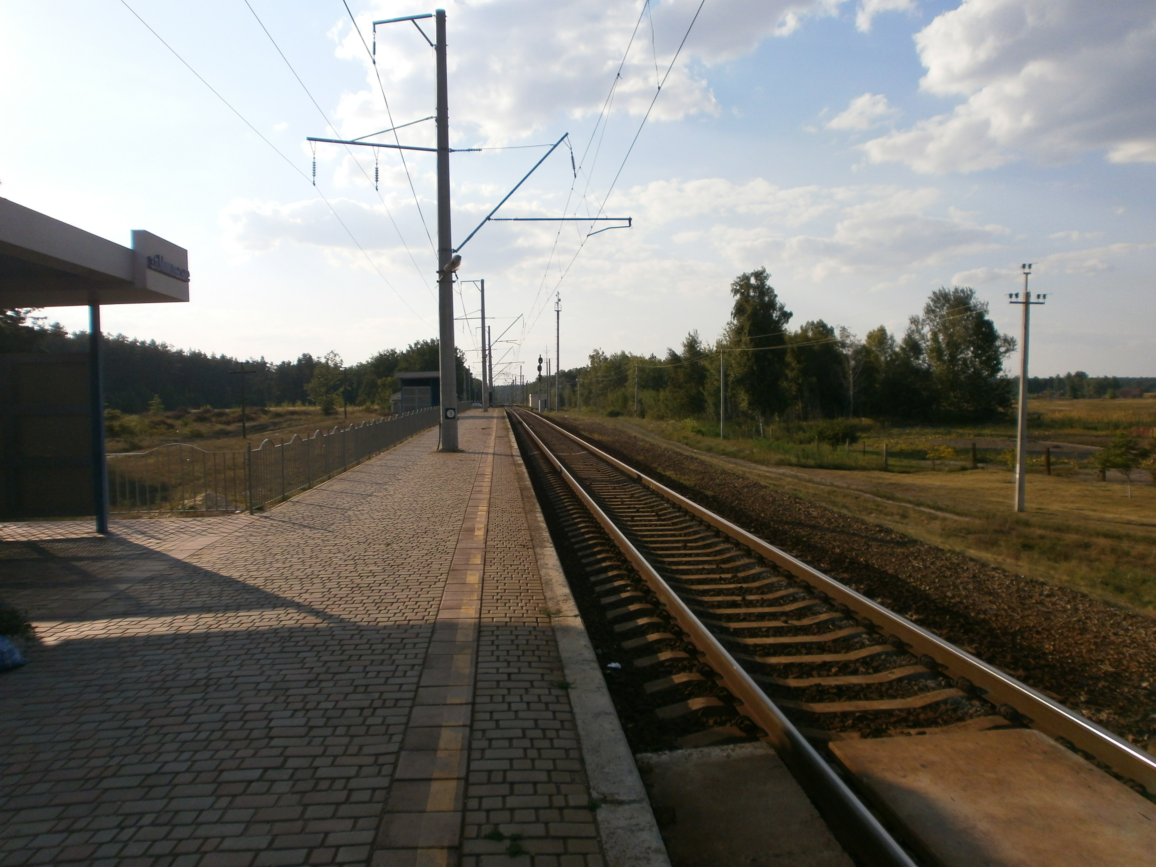 Загальний поздовжній вигляд залізничної платформи Микільське після її реконструкції